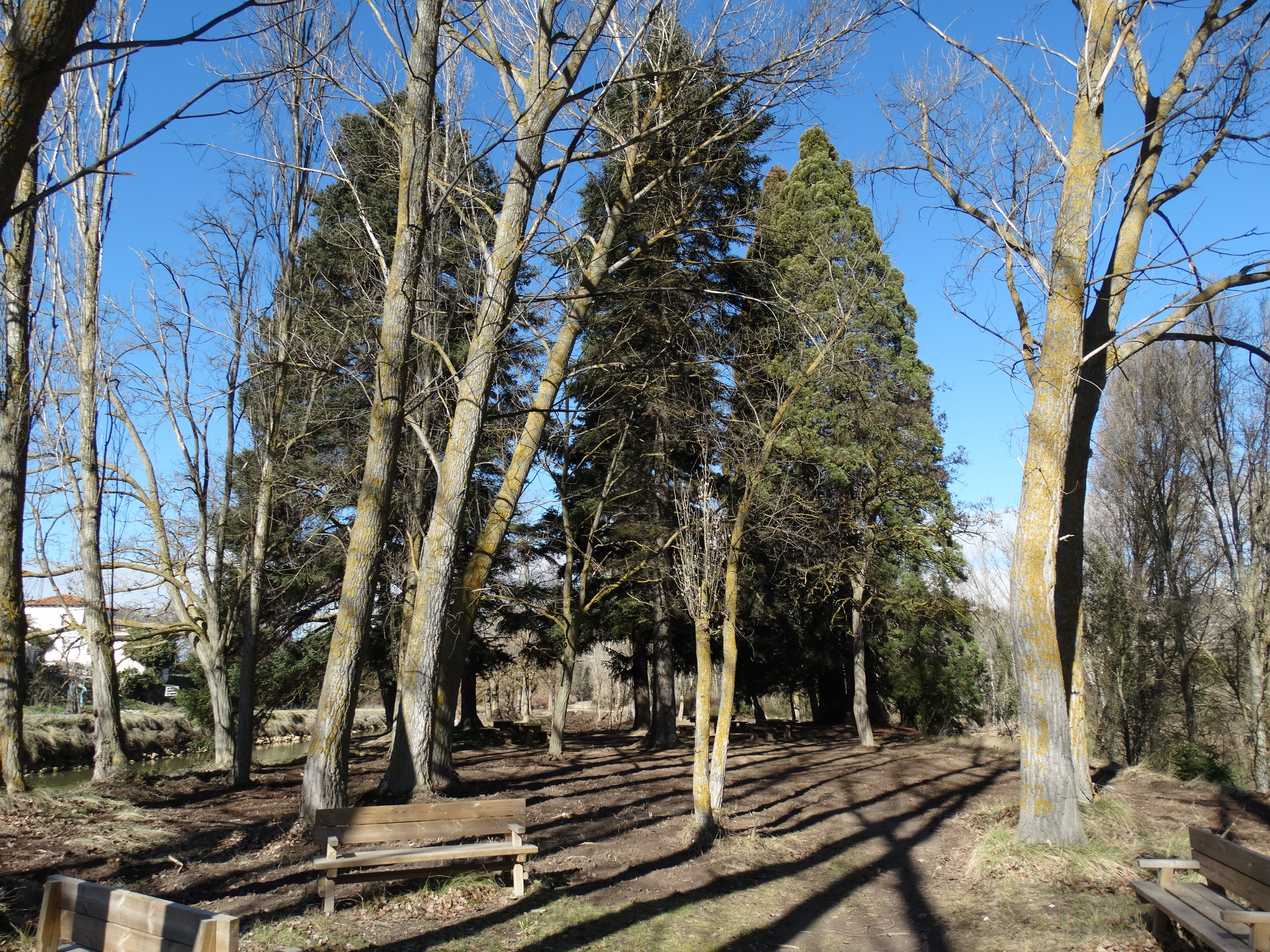 Sardón de Duero, Valladolid, España. Jardín del Carretero entre el Canal del Duero y el río Duero. Secuoyas gigantes milenarias.